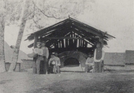 Отдельная печь для сушки рыбы в деревне Драготина на берегу Раскопельского залива